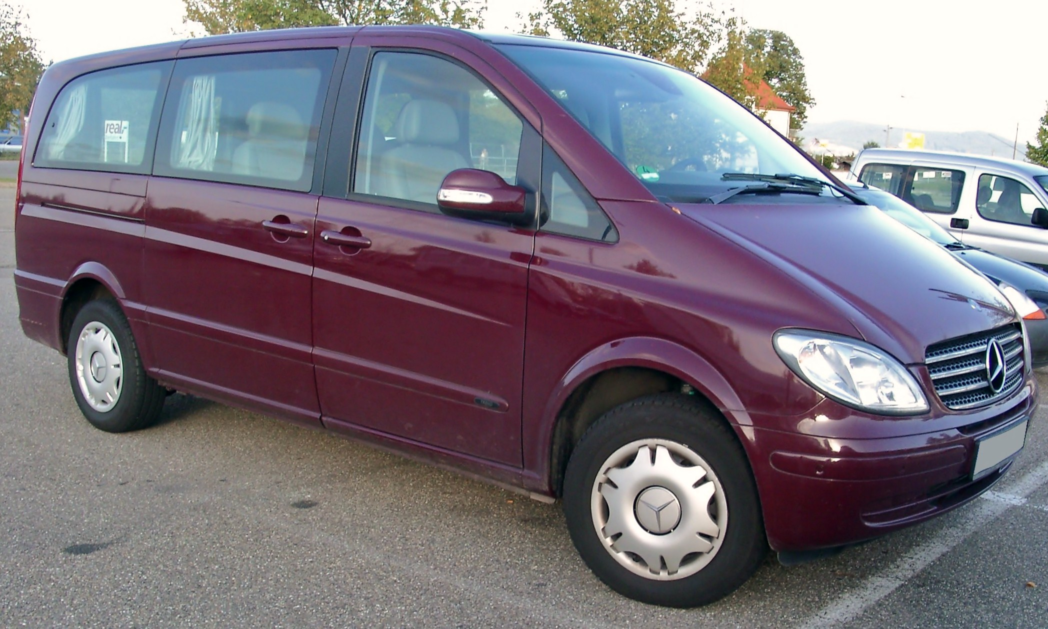 Mercedes Benz W639 (Viano)